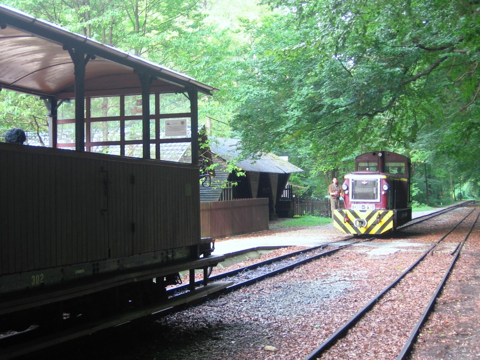 A D02-510 pályaszámú mozdony közelít KisMáv kocsijaihoz Garadna állomáson.